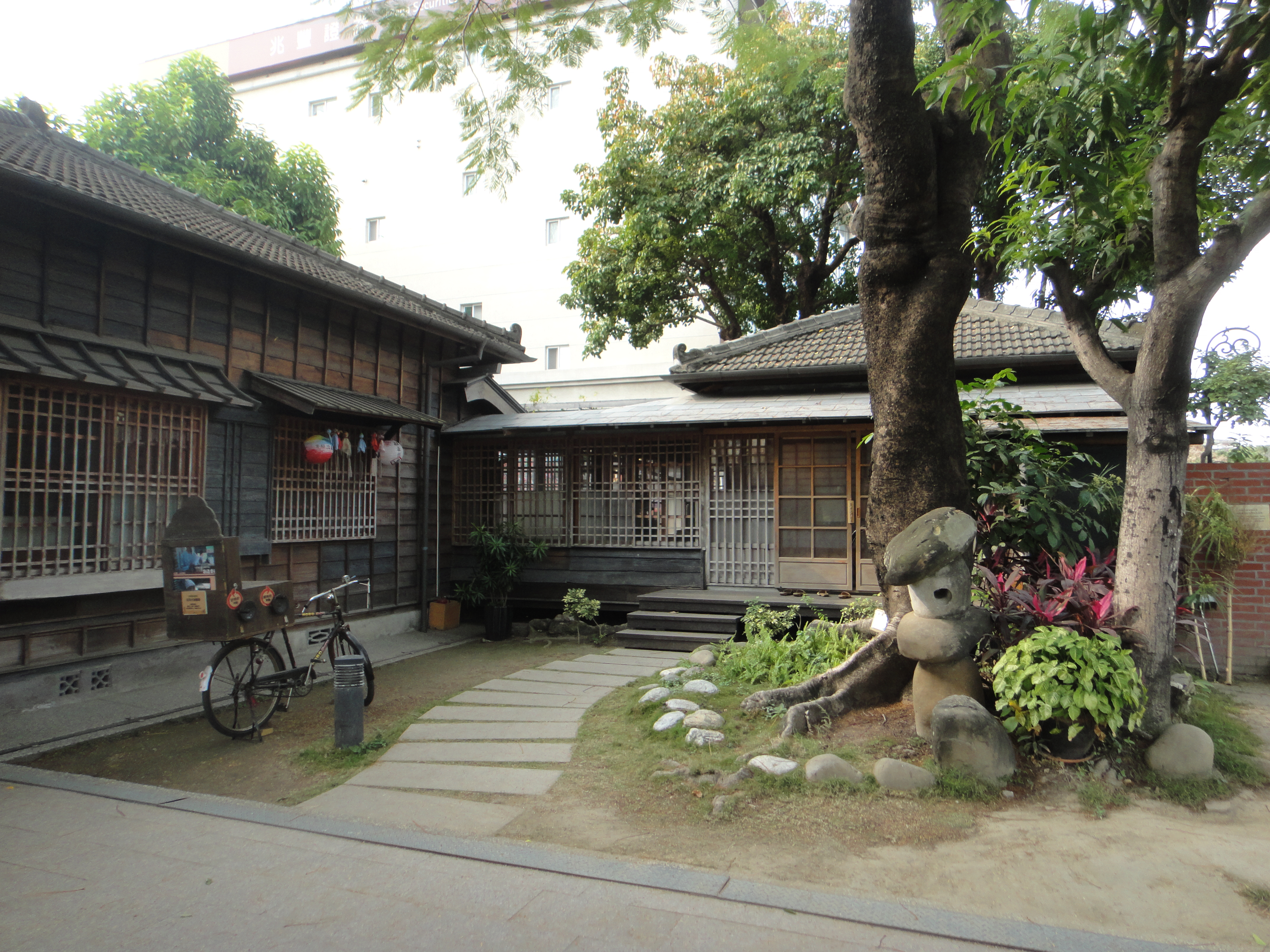 虎尾郡手官邸(側面)